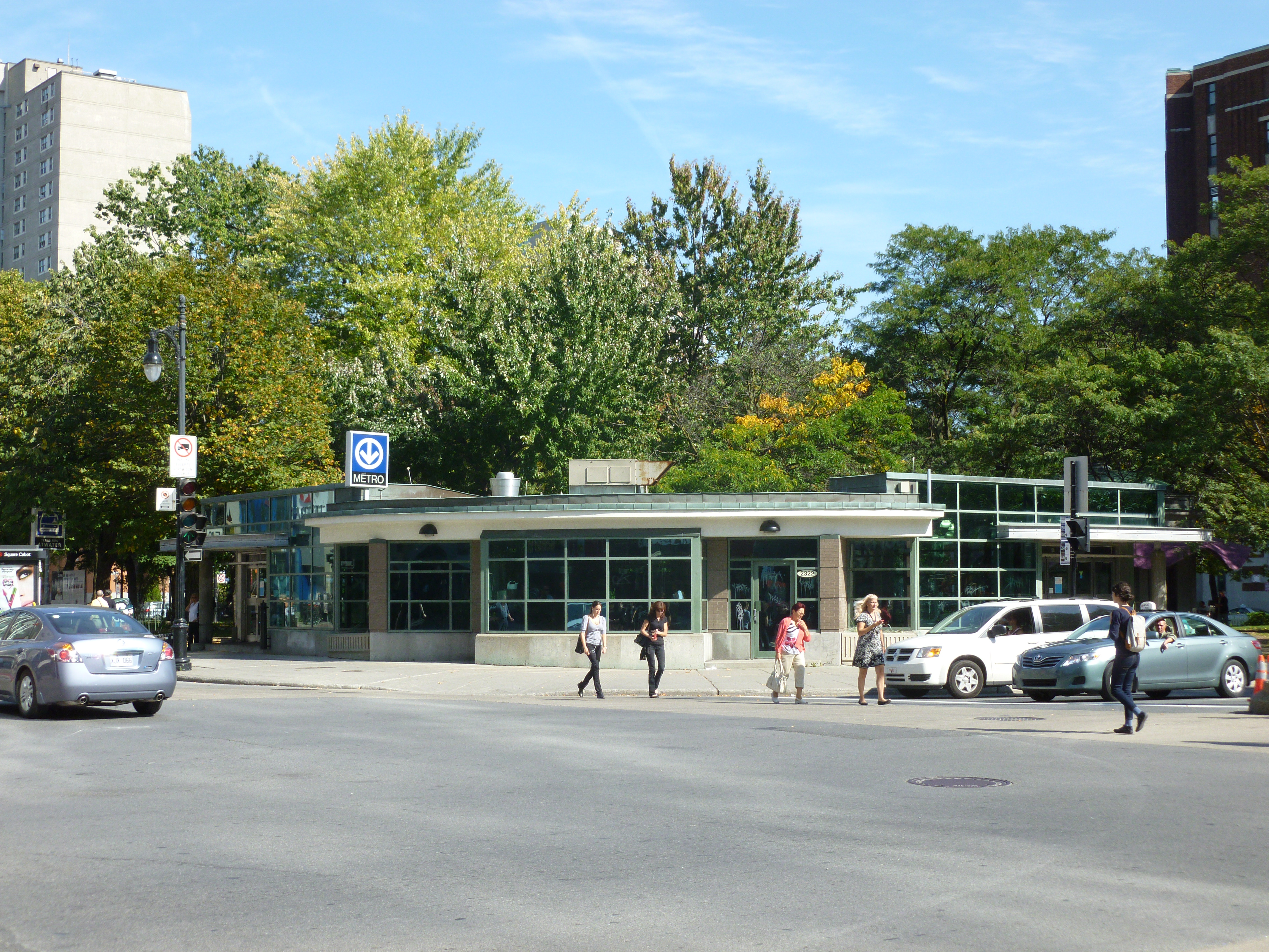 Édicule de la station Atwater à Montréal, Québec, Canada